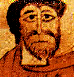 Miniatura de la primera mitad del siglo XII que representa a Sancho Ramírez de Aragón y a su padre Ramiro I de Aragón (con barba)